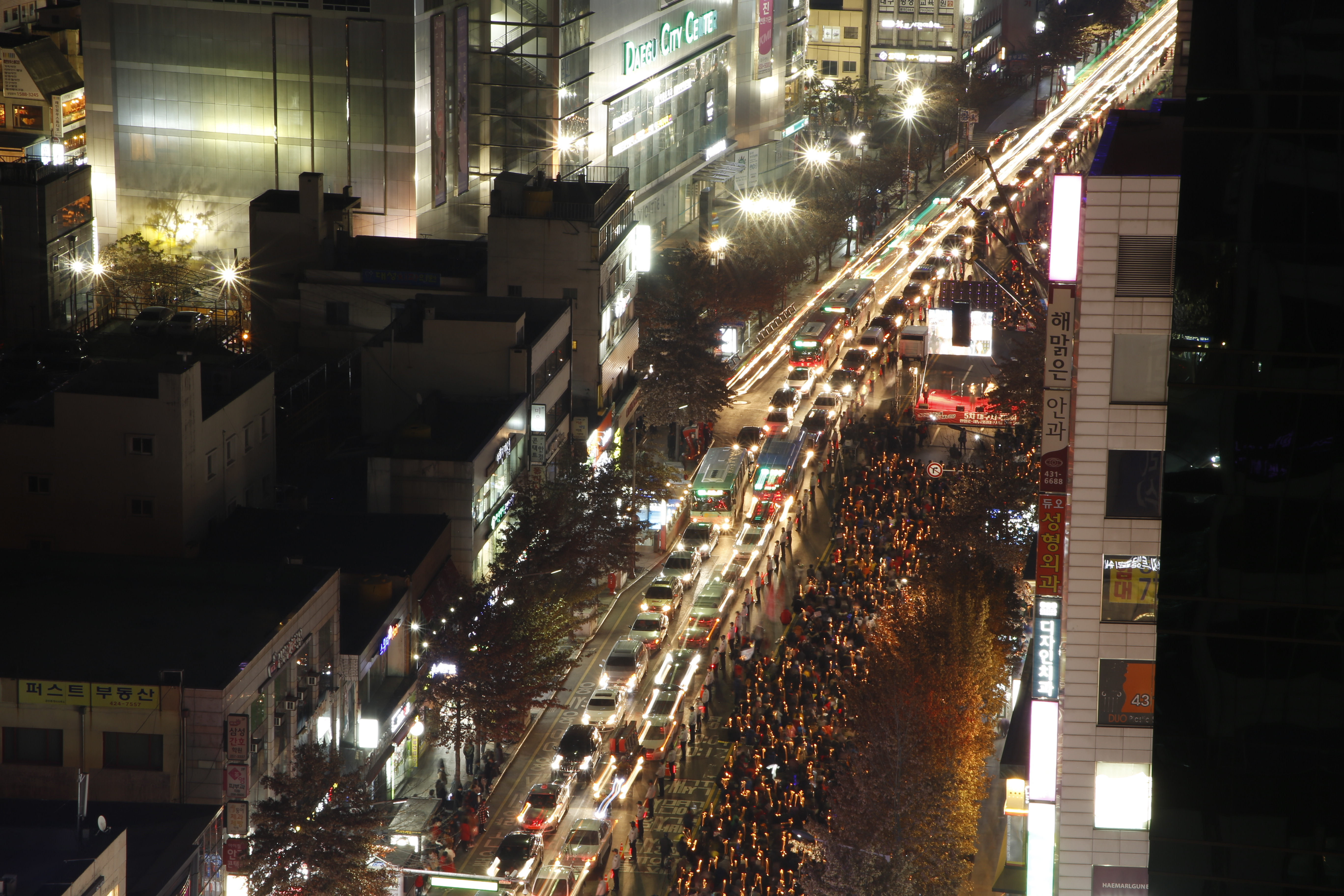 대구광역시 중구의 국채보상로(중앙네거리-공평네거리 구간)에서 있었던 집회 모습을 높은 곳에서 촬영하였다.